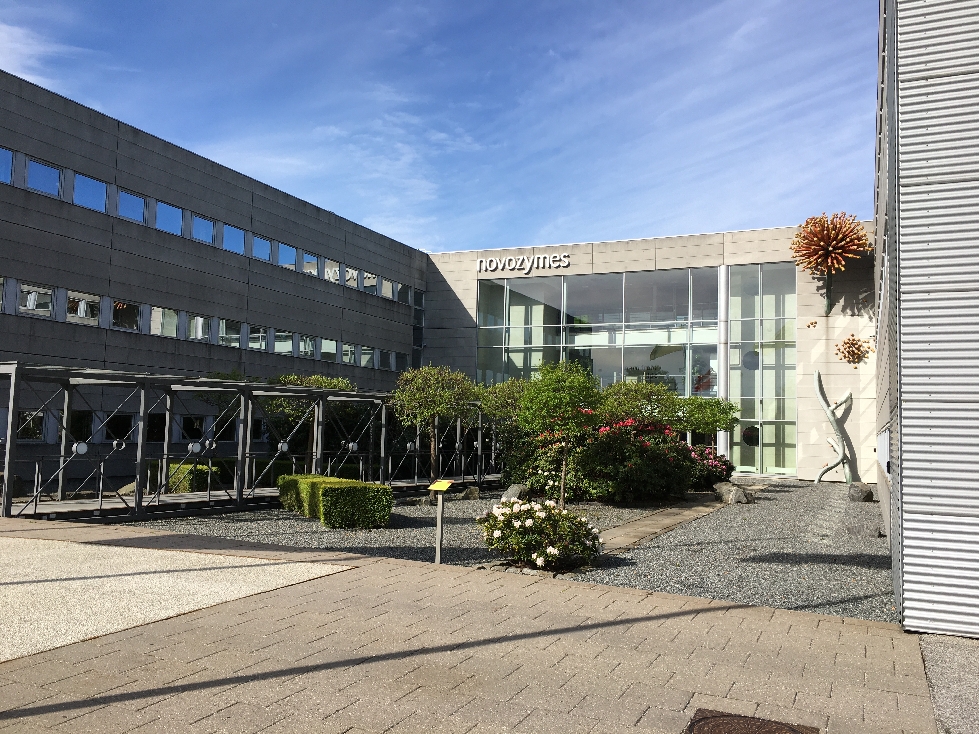 Novozymes A/S - hovedbygning i Bagsværd.